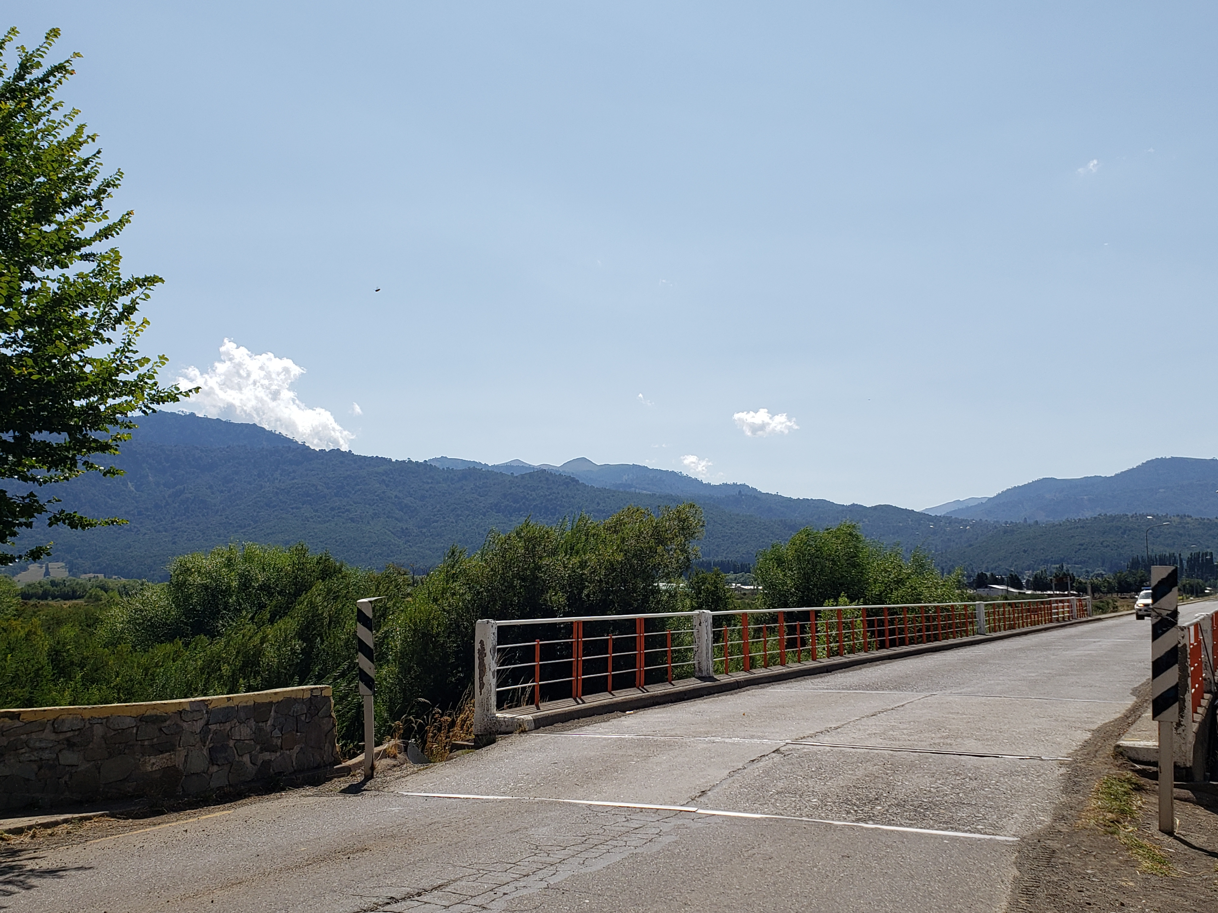 Cordillera de Las Raíces vista desde la entrada a Lonquimay